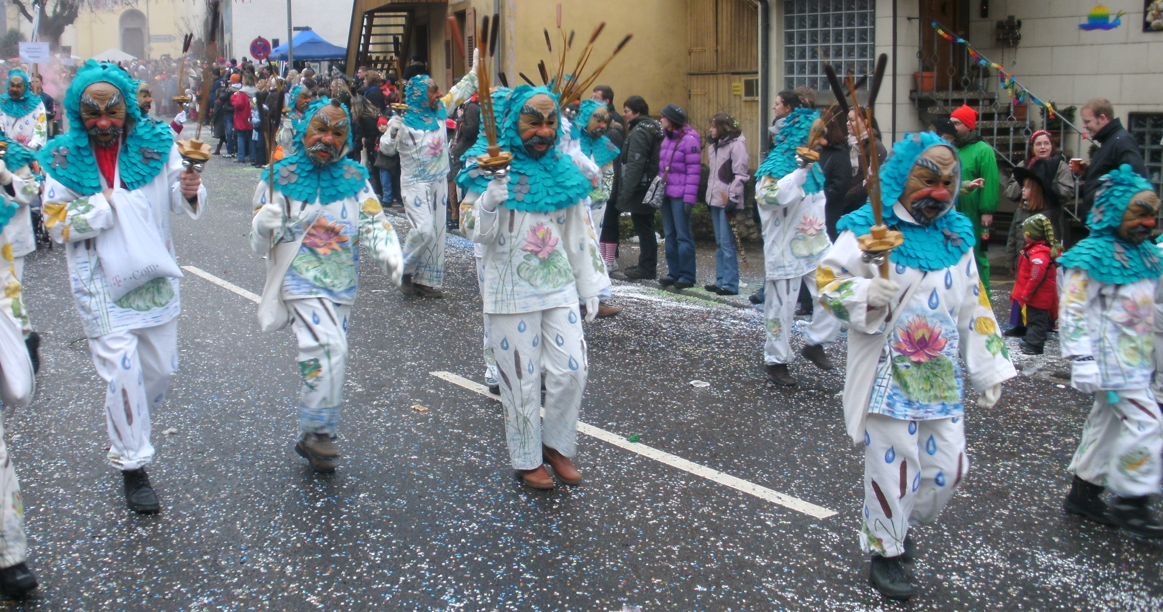 Wetti-Geister der Wetti-Zunft aus Behla (Schwarzwald-Baar-Kreis) beim Narrentreffen in Schwörstadt 2010. Die Masken sind aus Holz handgeschnitzt, das Häs handbemalt.[1]